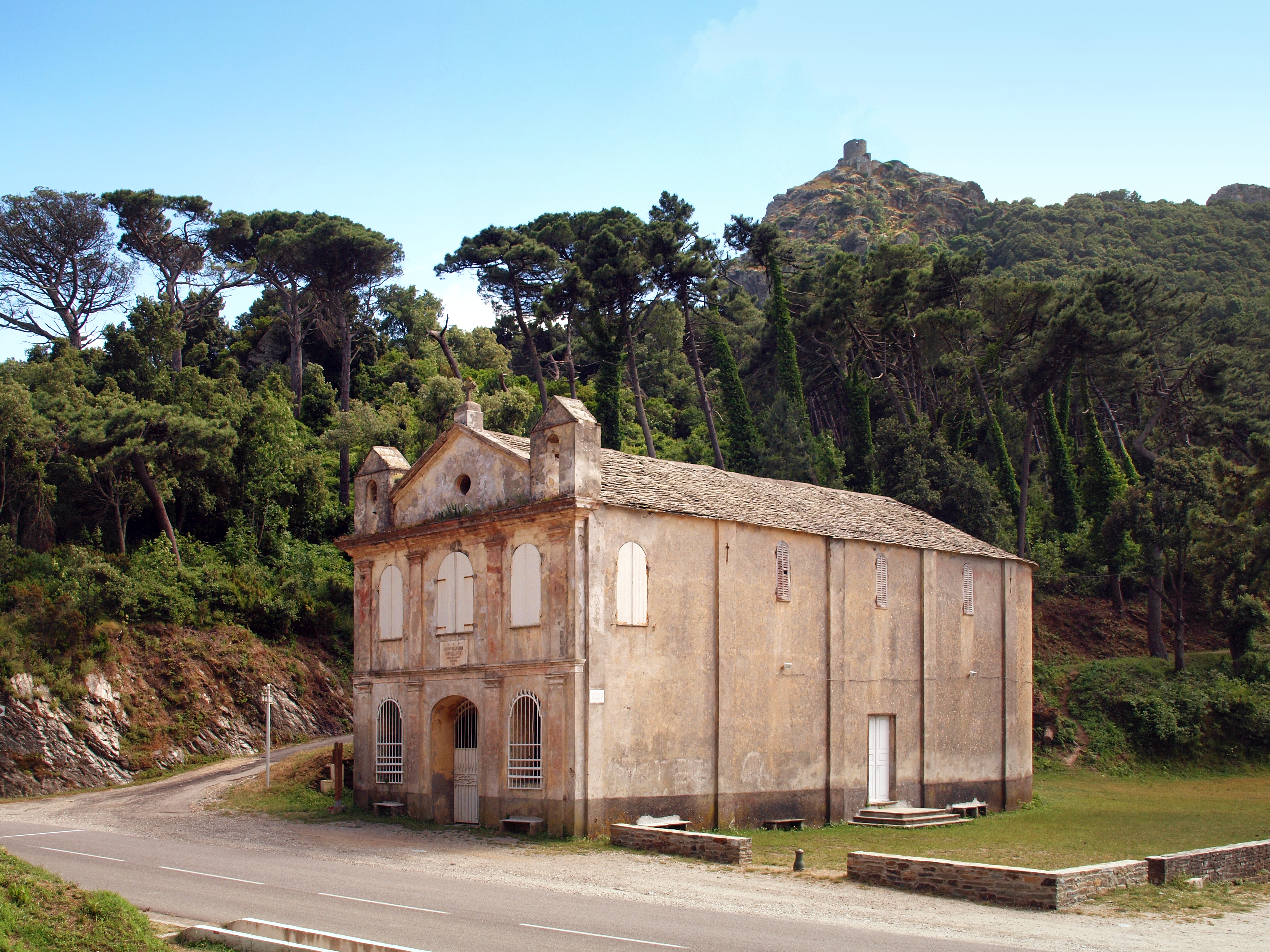 Pino (Corse) - Col de Santa-Lucia (381 m) avec la chapelle Santa-Lucia. À l'arrière-plan, la tour de Sénèque (Luri)